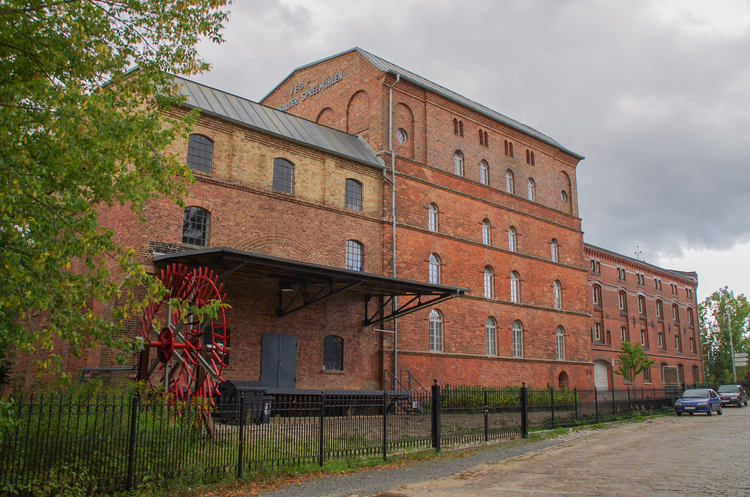 Fürstenwalde in Brandenburg. Die Mühlen stehen direkt an der Spree.